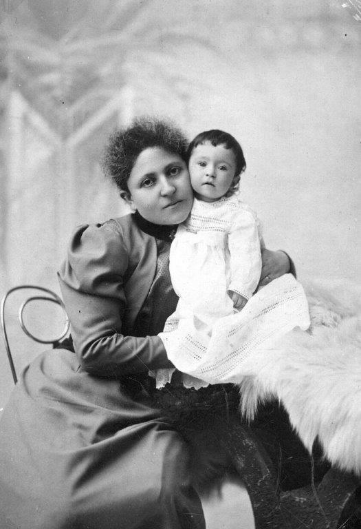 ד"ר רוזה וולט- שטראוס עם בתה, נלי. באדיבות הארכיון הציוני המרכזי